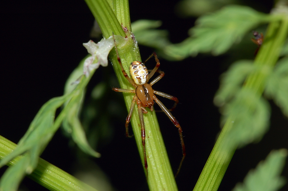 Theridion impressum, det. Michael Hohner & Jürgen Peters, Roeblingen nearby Halle (Saale), Germany